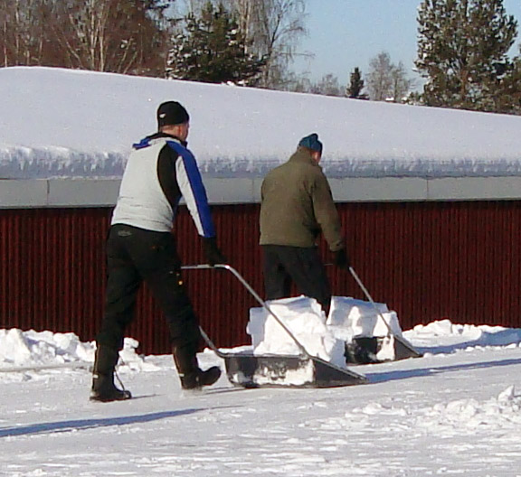 Användning av snöslädar/snöbjörnar